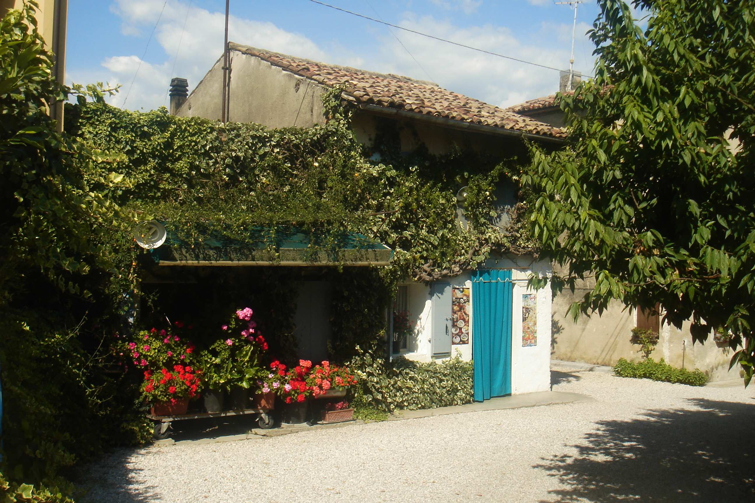 Vecchia osteria di Castello Roganzuolo